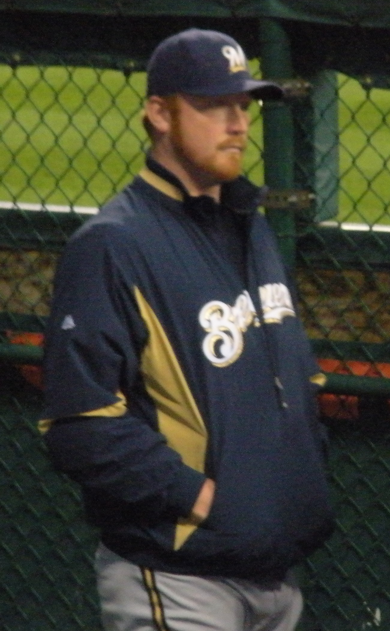 Seth McClung